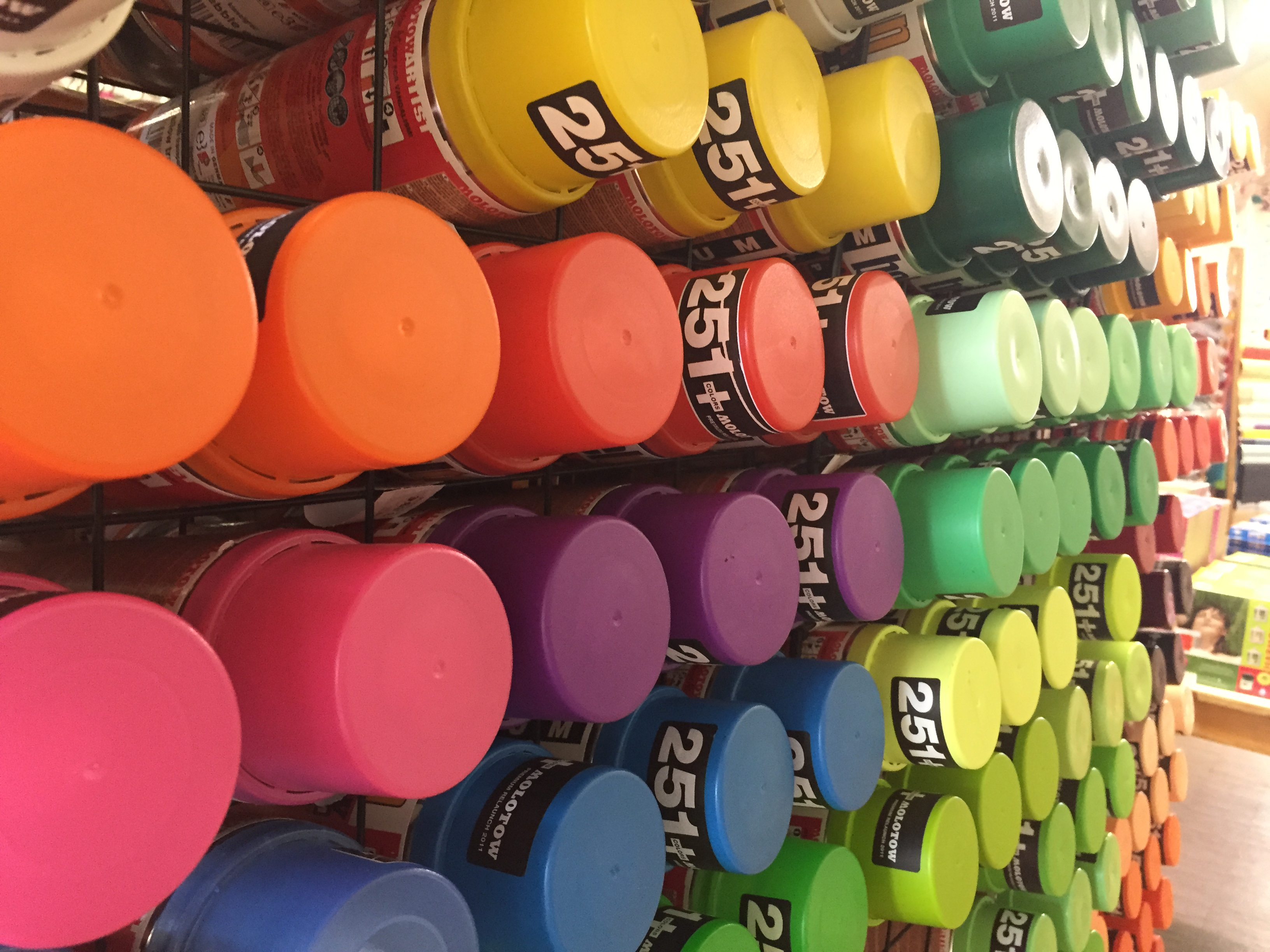 spray cans Farbdosen